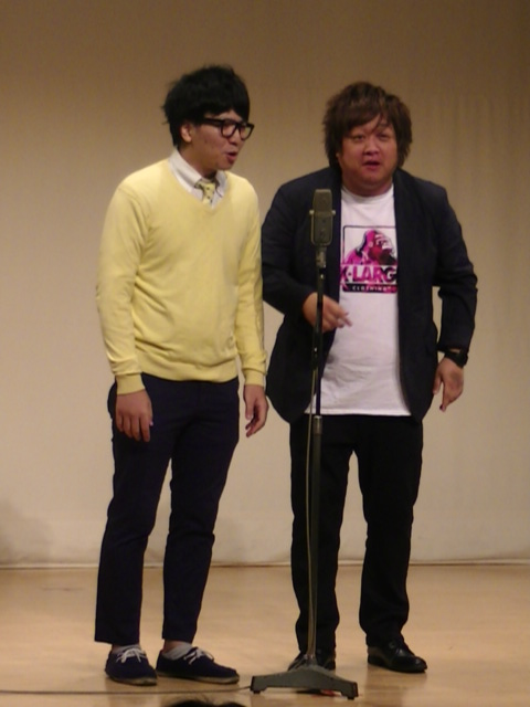 ホタテーズ (2018年10月)